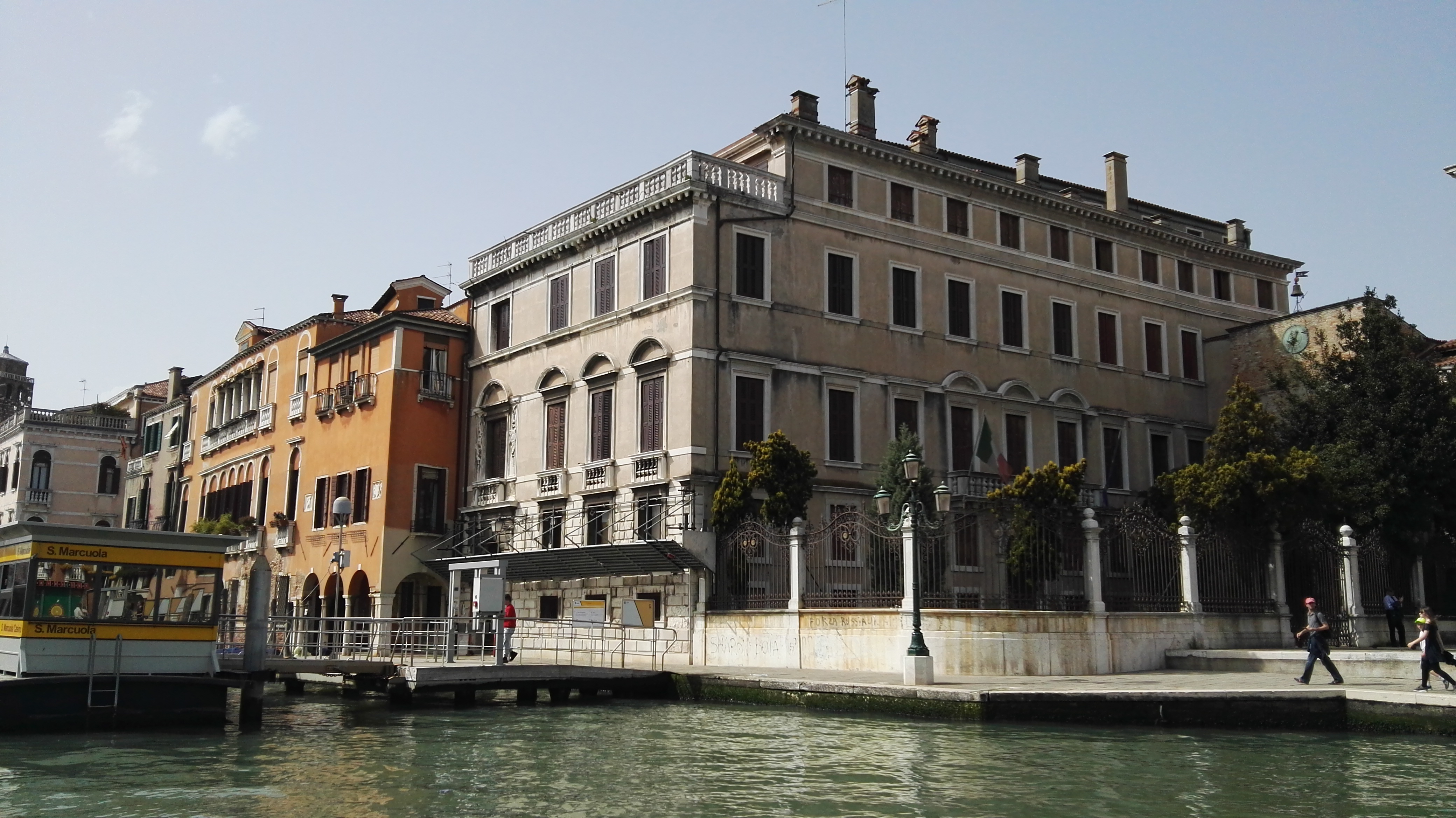 Bebauung am Canal Grande in Venedig am San Marcuola stop (unter anderem Palazzo Memmo Martinengo Mandelli)